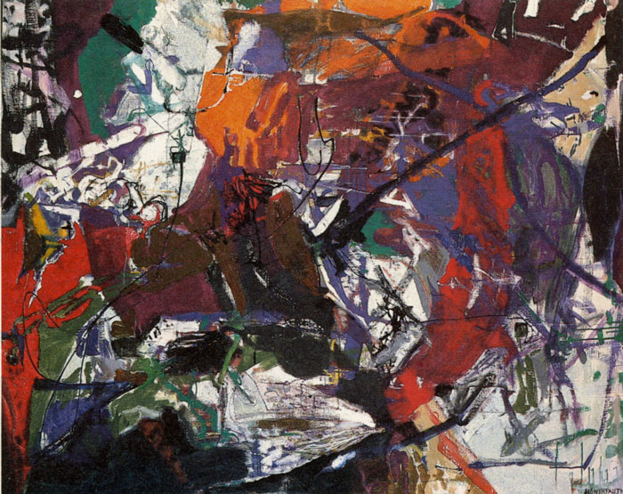 Abstraktes Gemälde von Irma Hünerfauth: Ohne Titel, 1964